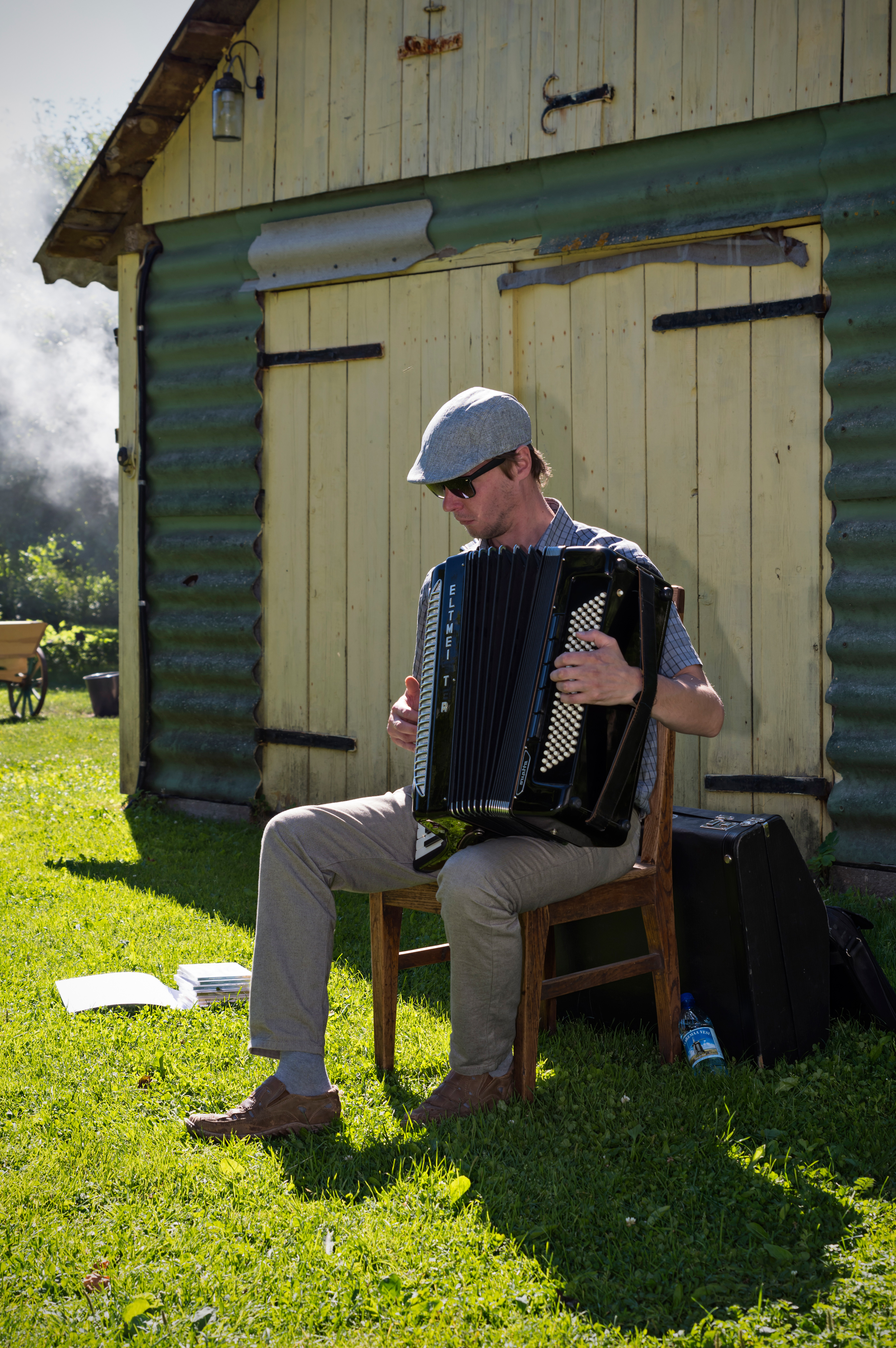 Indrek Liit akordioni mängimas Kassari põhjaosas, Esikülas, Hiiumaa kohvikute päeval, 1. augustil 2020.